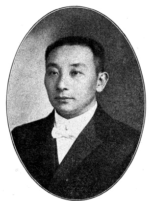 中華民國國會議員